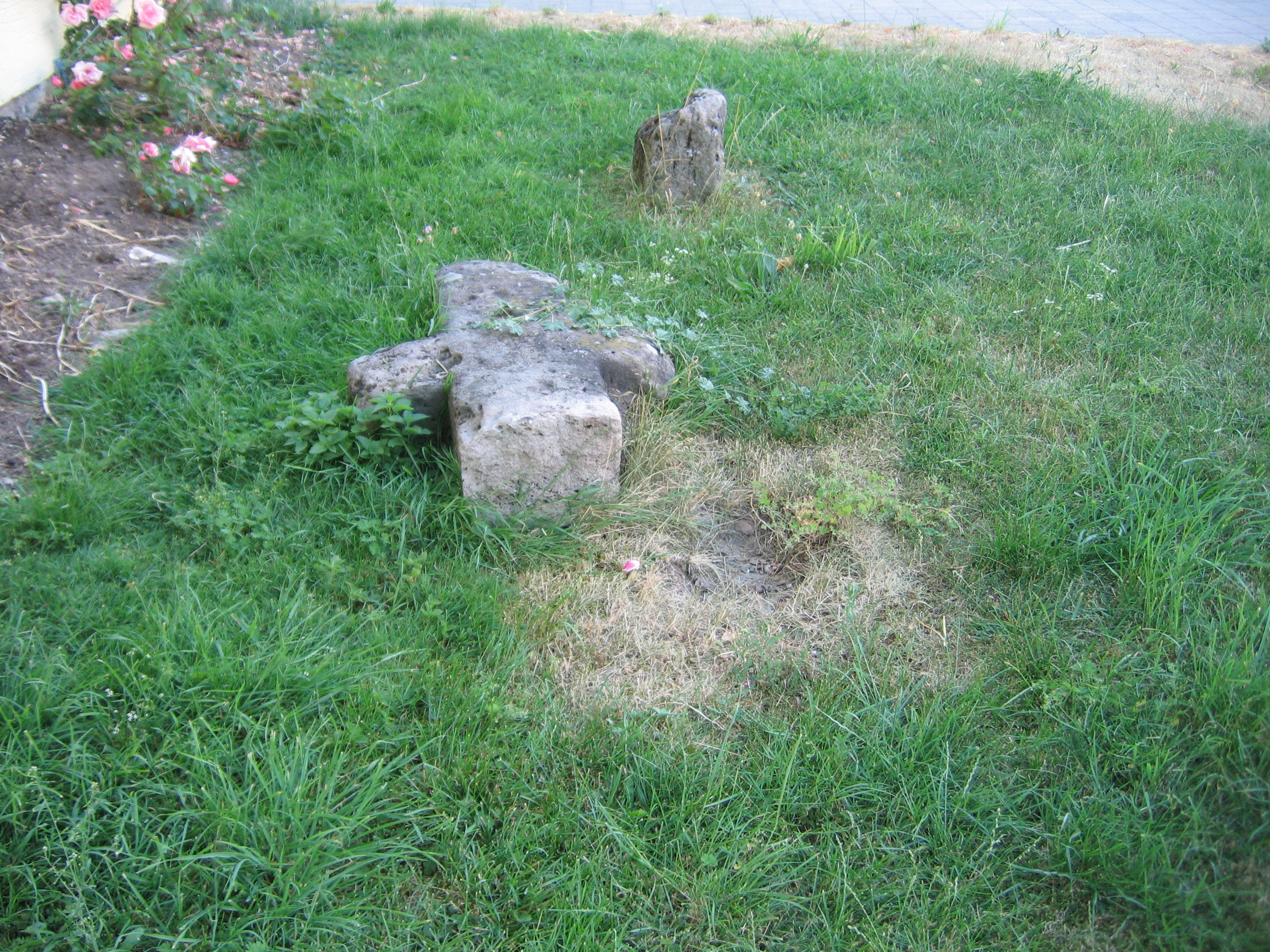 Mittelalterliches Steinkreuz in Dornhausen b. Geslau/Mittelfranken